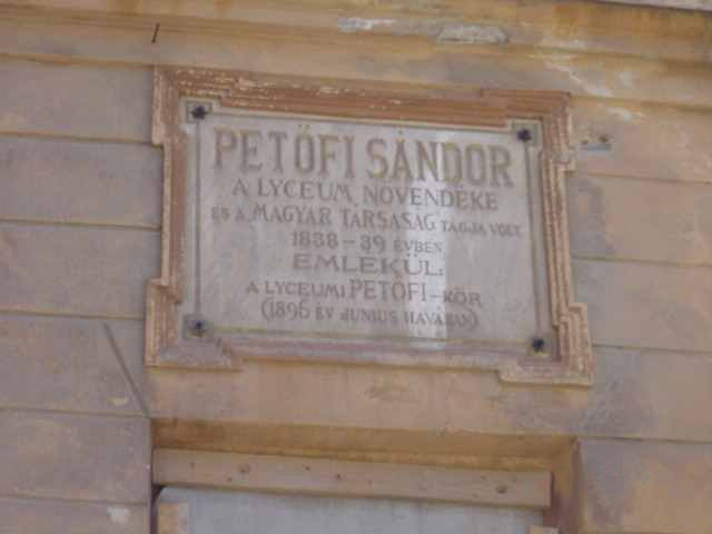 A képen a Petőfi Sándornak emléket állító tábla a Selmecbányai Lyceum bejáratánál.